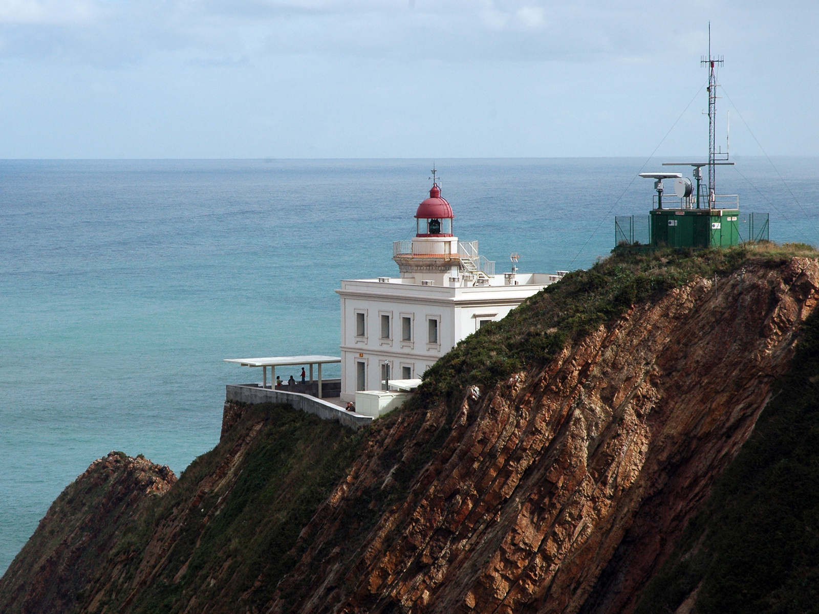 Faro de Torres